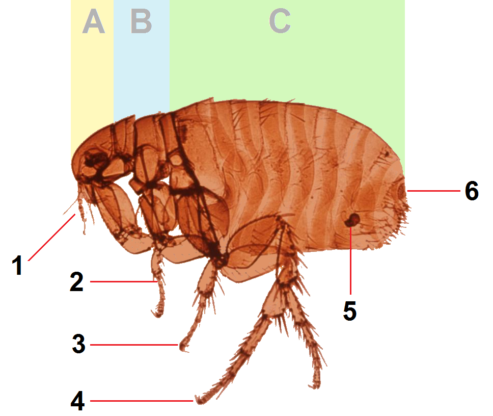 Xenopsylla cheopis femelle (puce du rat) adulte - domaine public - (image id 2741)